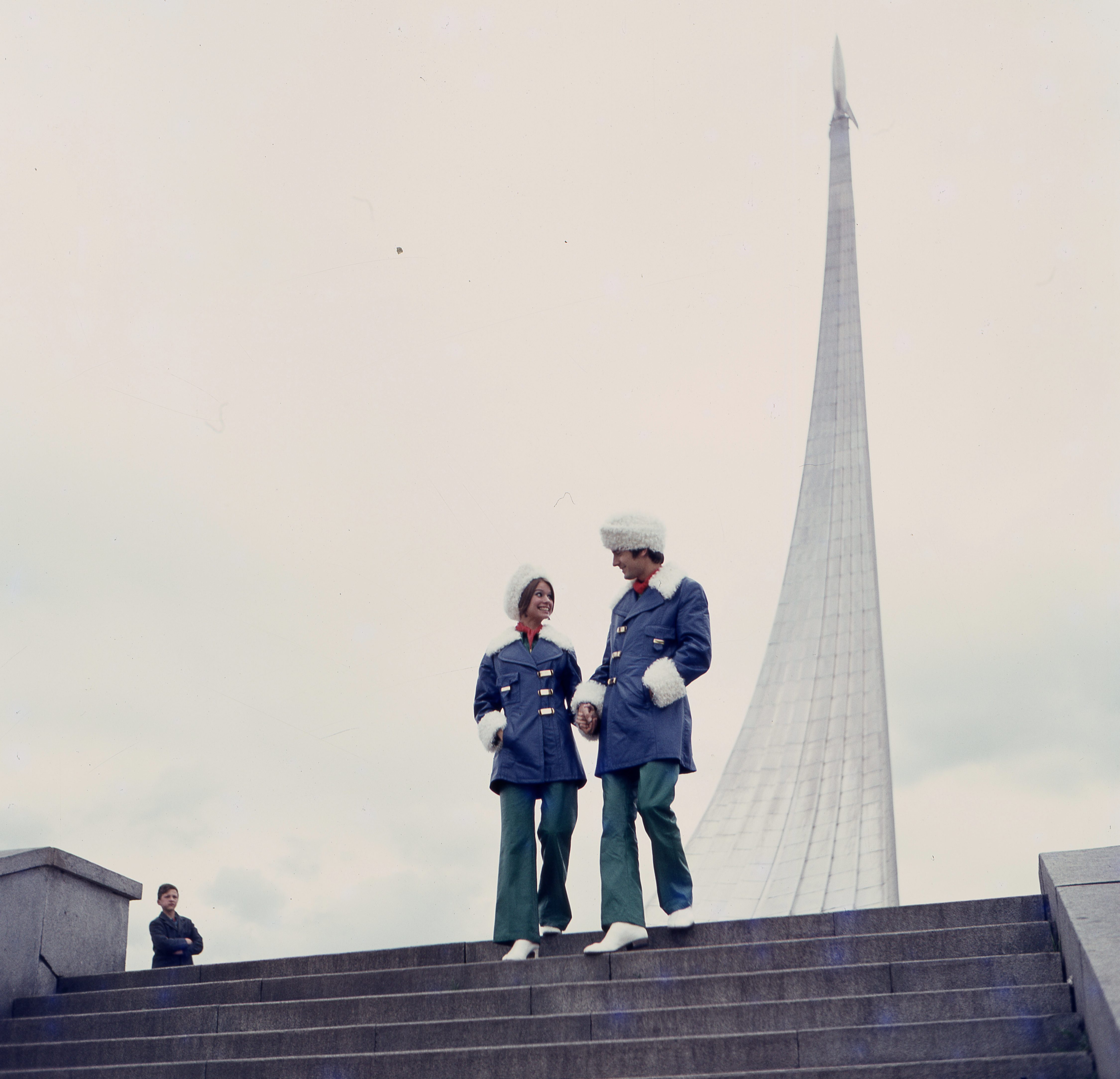 a Világűr Meghódítása emlékmű. Location: Russia, Moscow Tags: ad, fashion, Soviet Union, colorful, monument Title: a Világűr Meghódítása emlékmű.